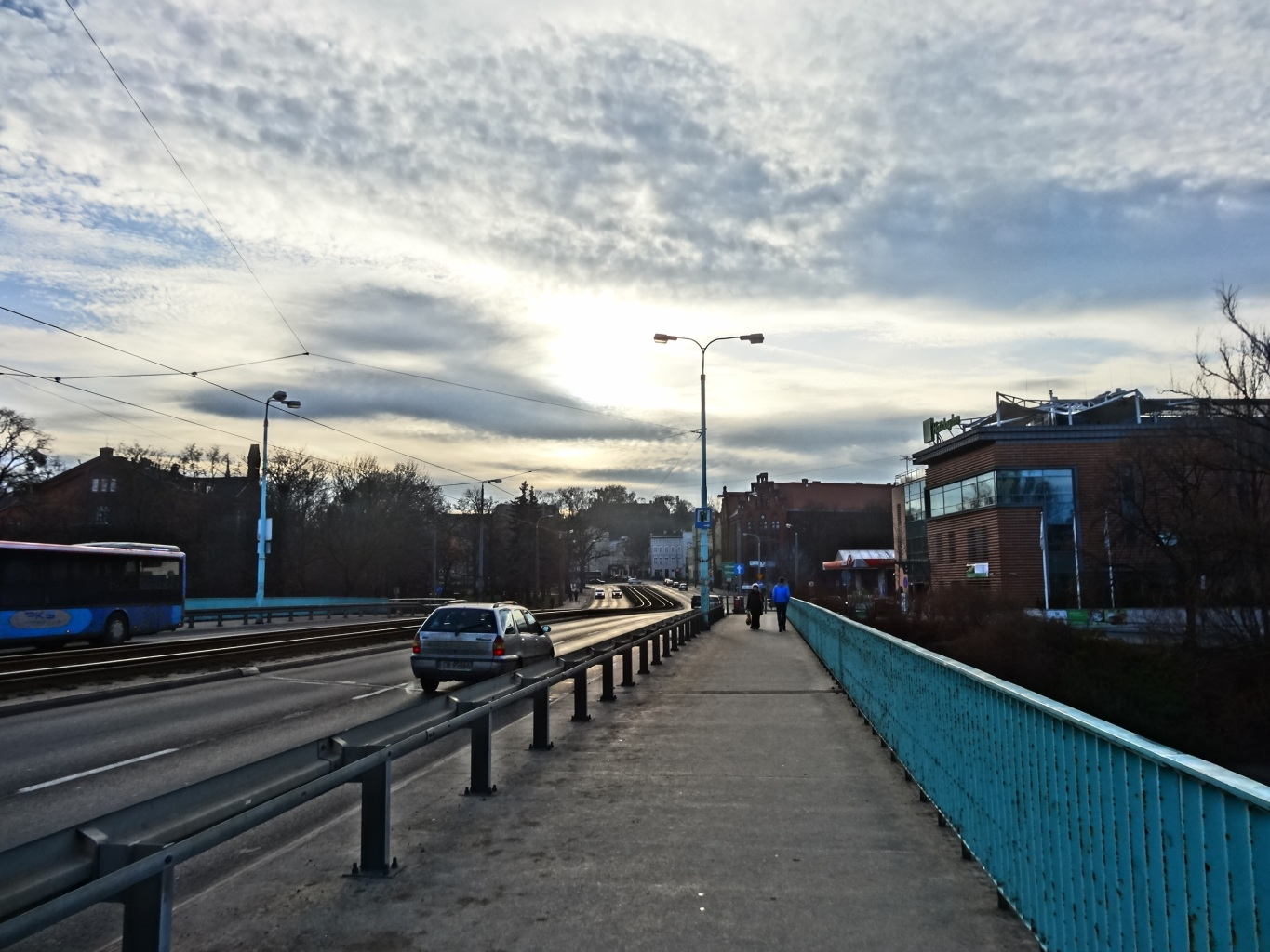 Ulica Bernardyńska w Bydgoszczy